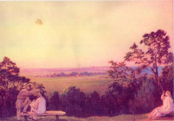 Вид имения Давыдкова вблизи реки Сетунь